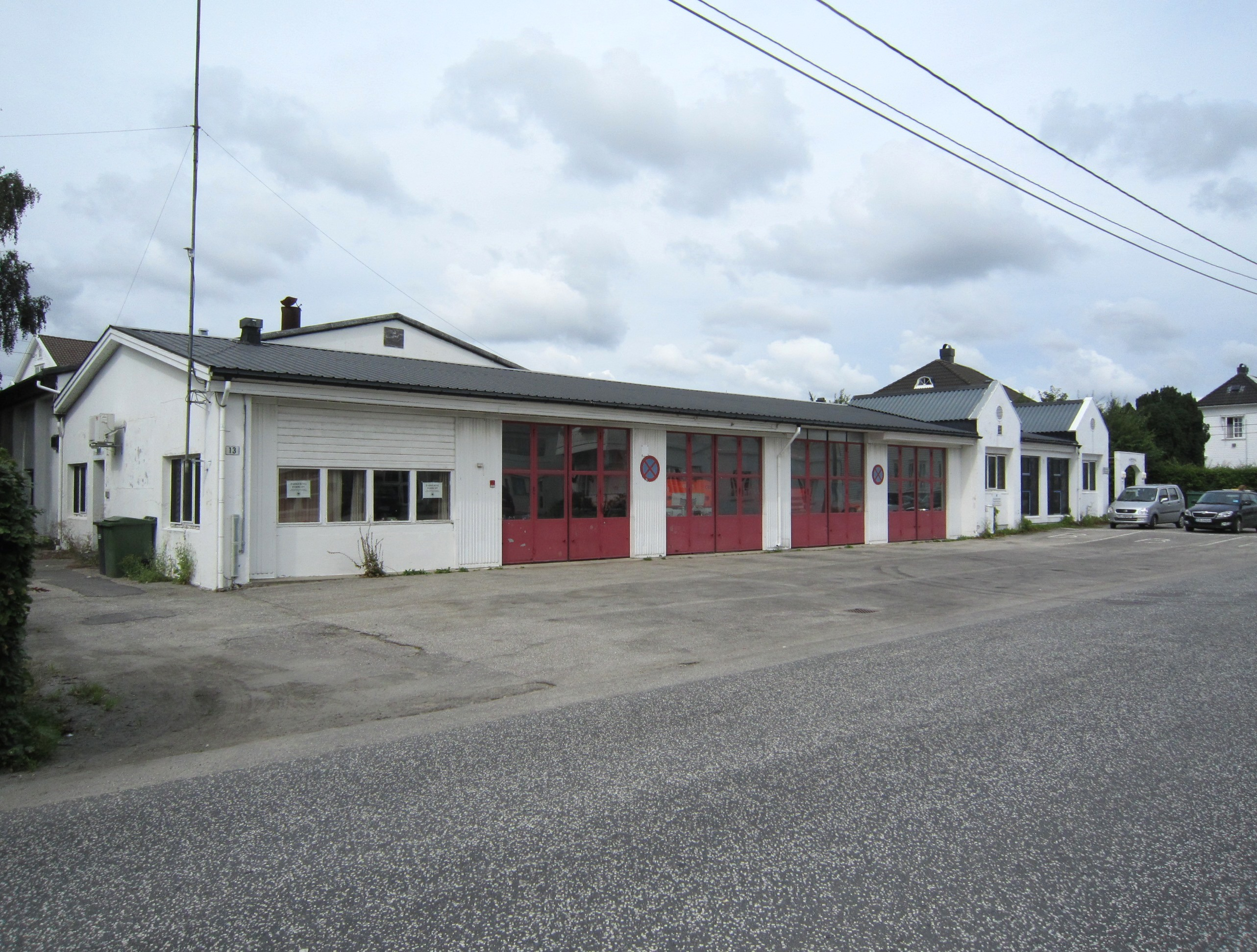 FV236 går forbi brannstasjonen i Lillesand.